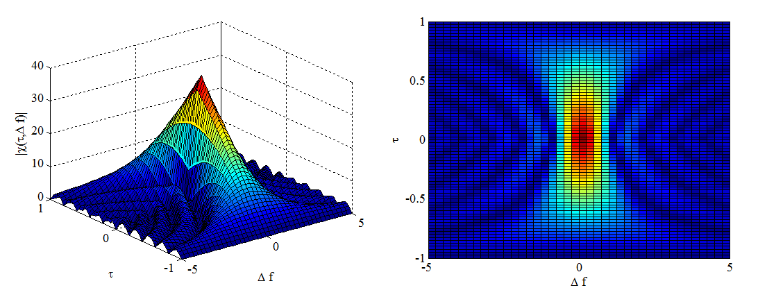 Функция неопределенности прямоугольного импульса